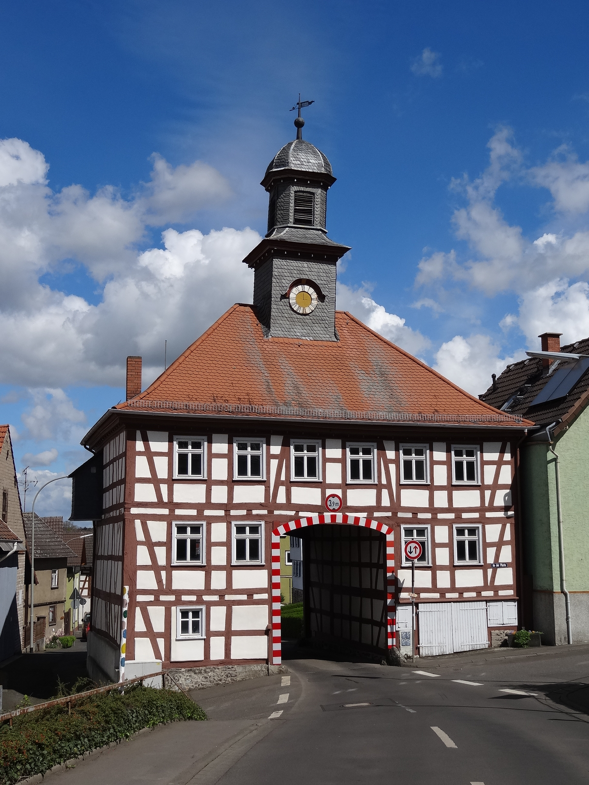 Ortsstraße 35 (Ober-Bessingen)